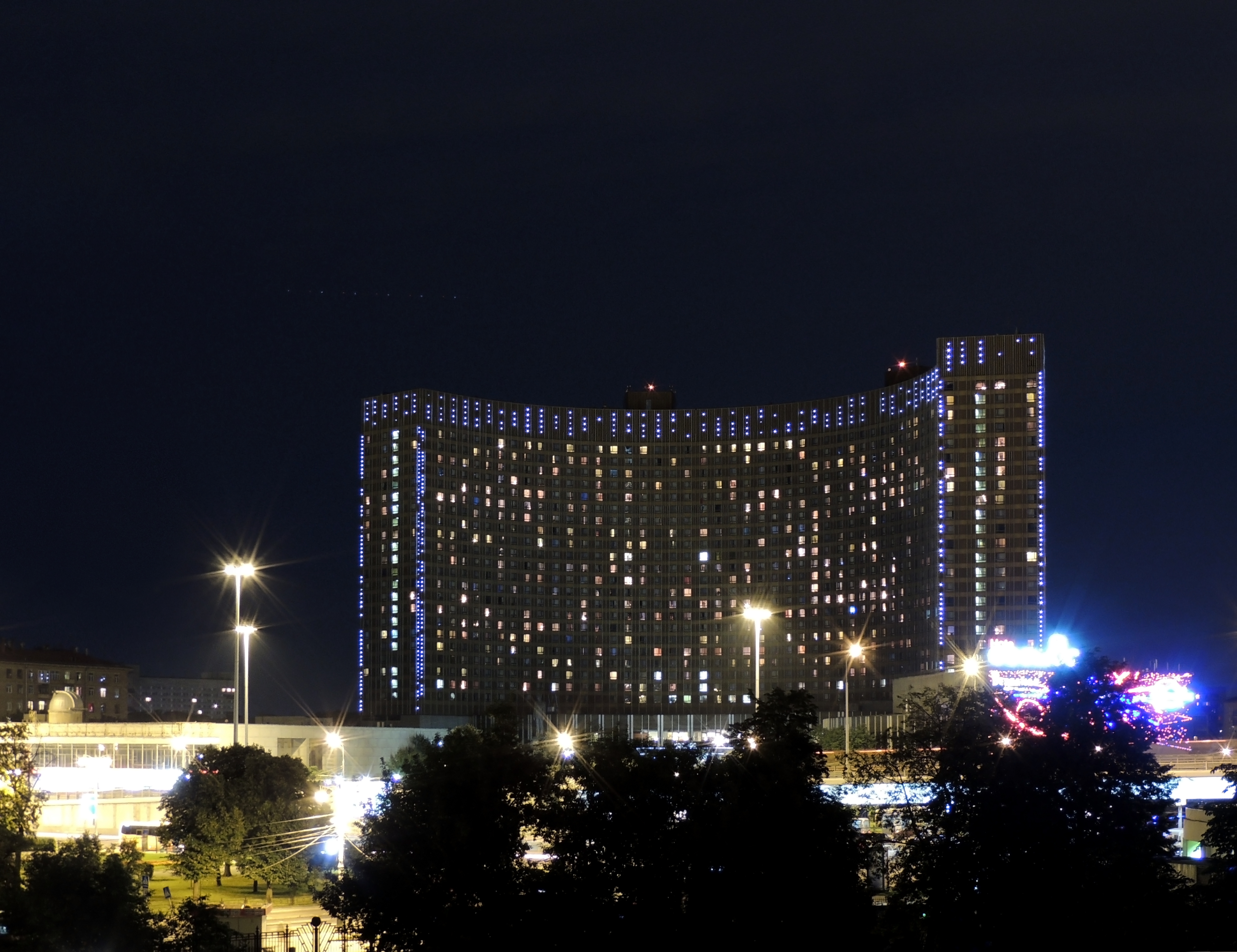 Гостиница Космос, Москва